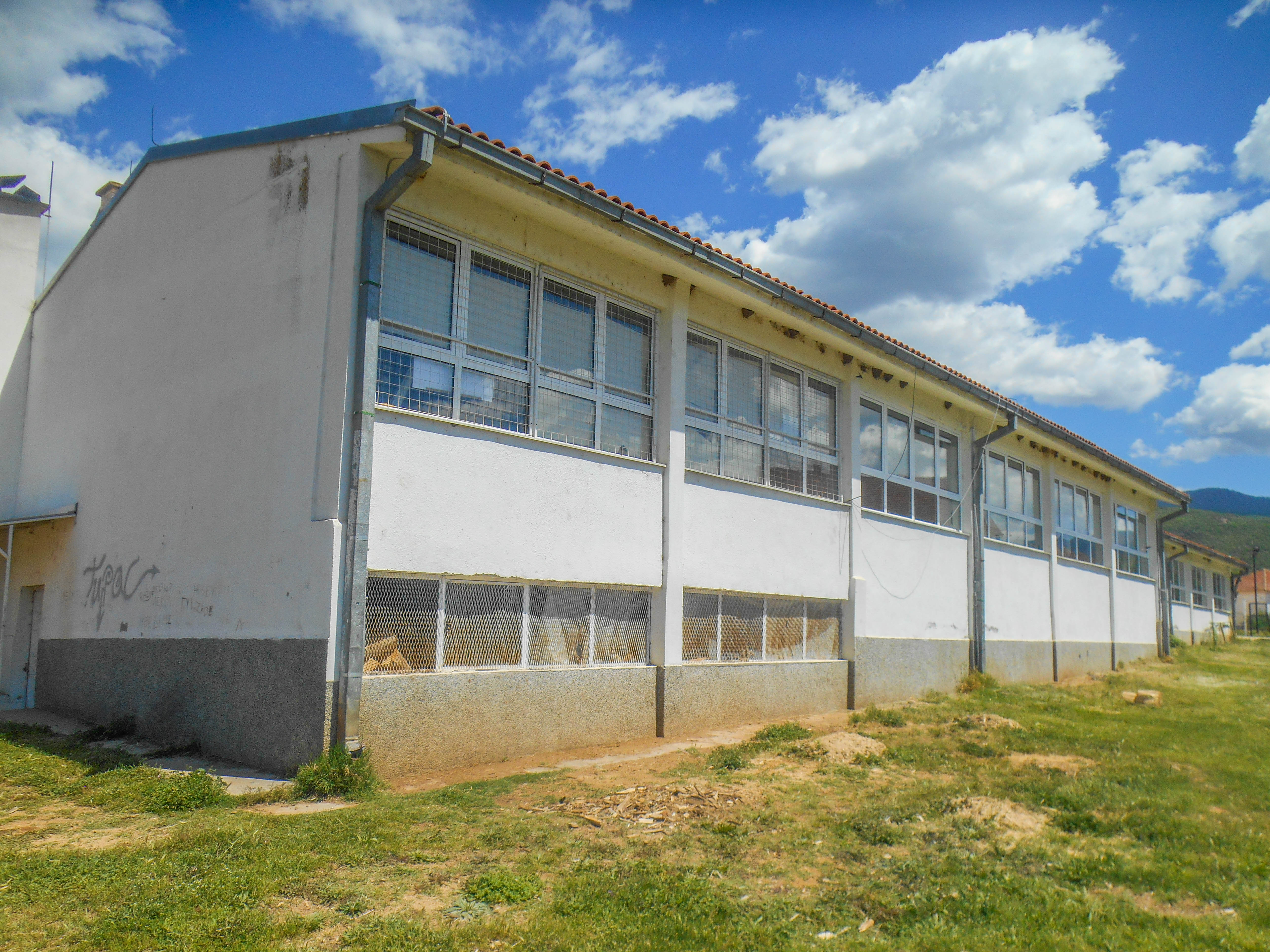 Основно училиште „Атанас Нивичански“ - Нова Маала